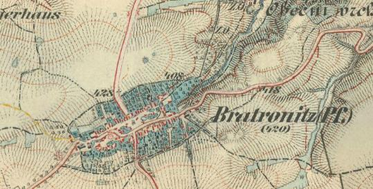 Bratronice na mapě třetího vojenského mapování.